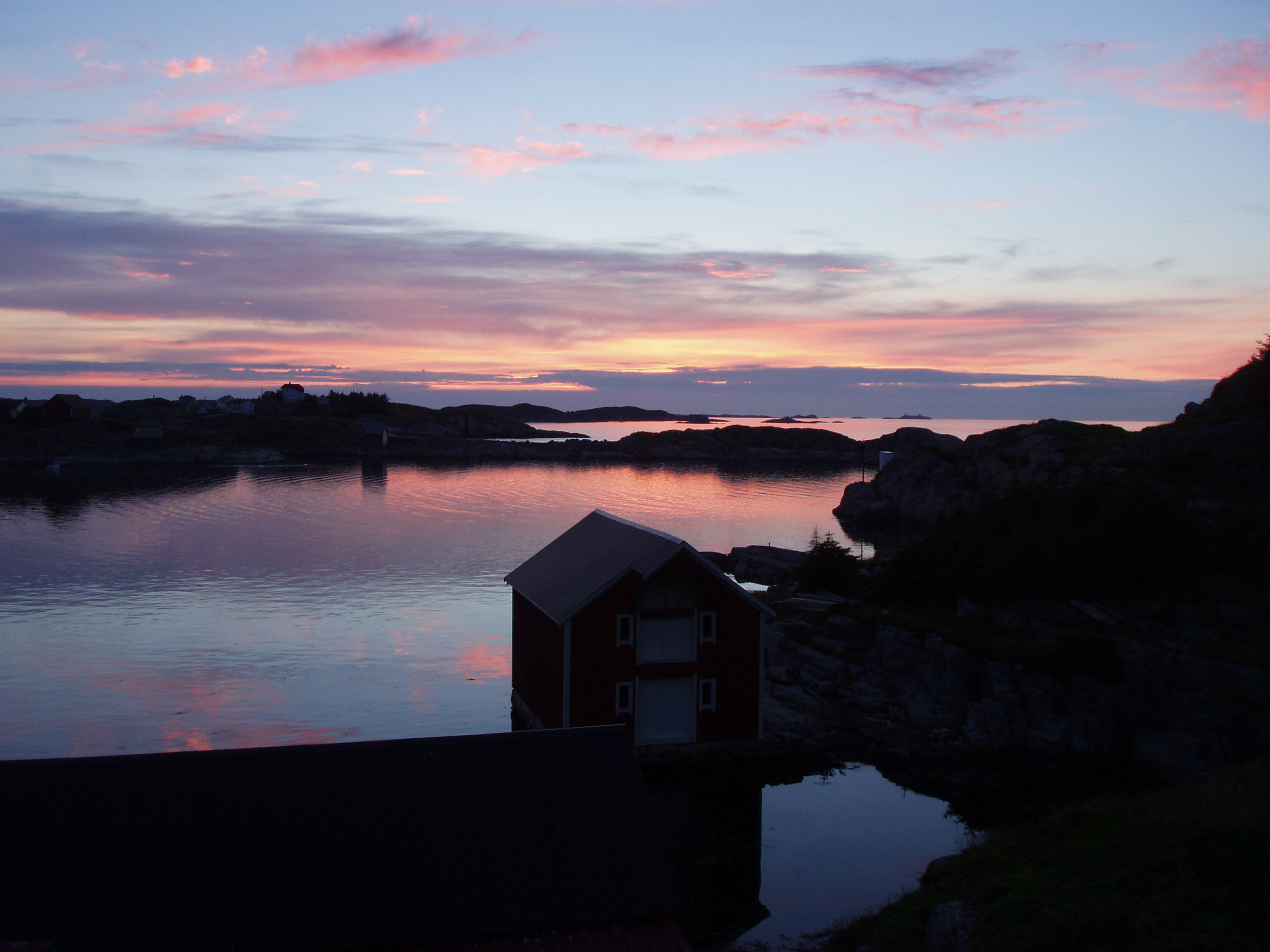 Sunset in Fedje in July 2006. Rognsvågen in front.